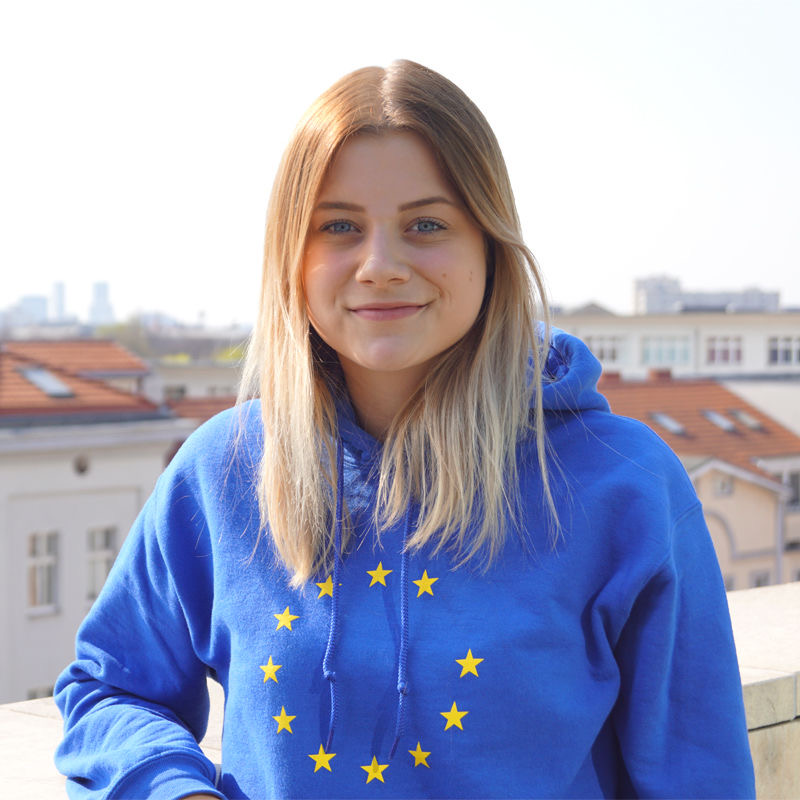 Deutsche Politikerin, Influencerin und Studentin Lilly Blaudszun.